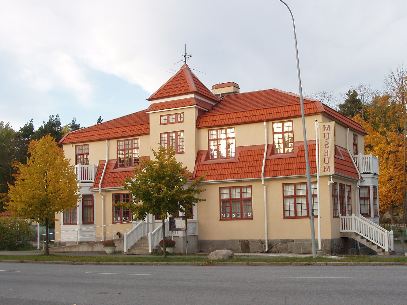 Lidingö museum. Hembygdsmuseum för Lidingö kommun.